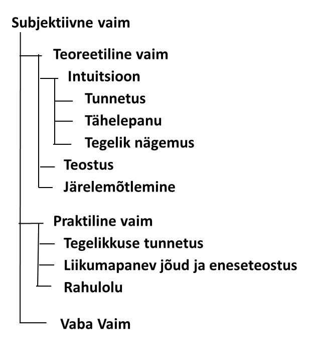 Hegeli vaimukäsitlus raamatust "Psyhologie"